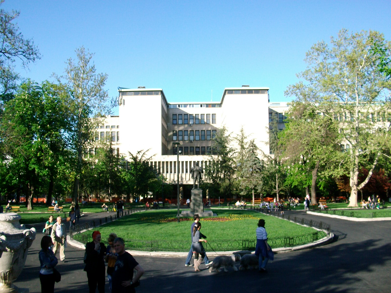 Поглед са Студентског трга ка Универзитетском парку